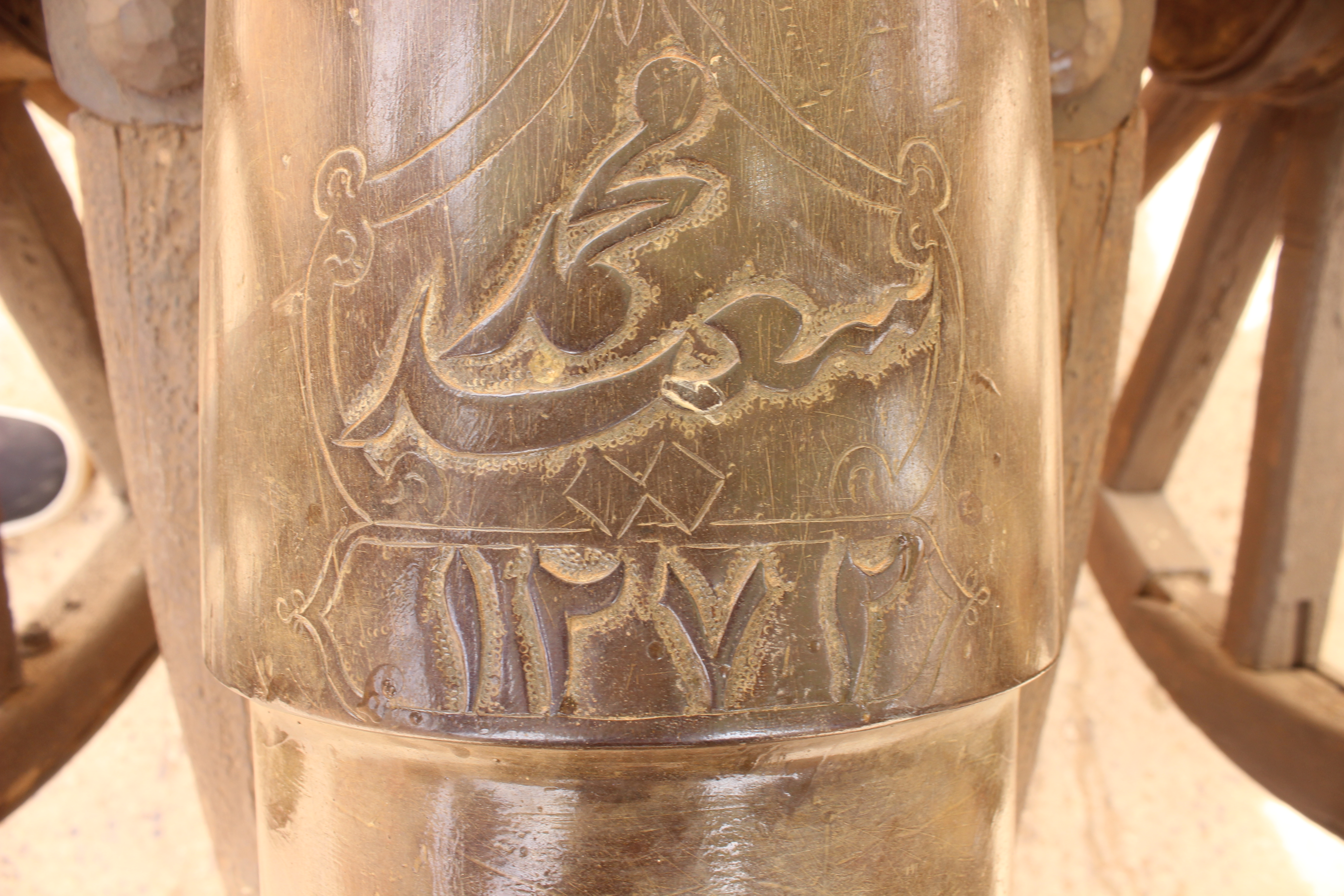 مدفع لعصر المهدية متواجد بمتحف بيت الخليفة بأمدرمان - الخرطوم - السودان